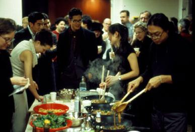 Tiravanija